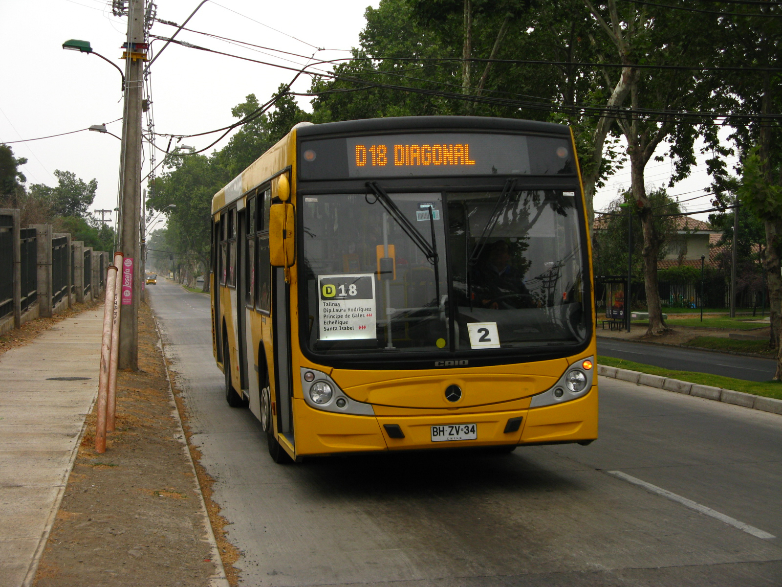 Bus del Alimentador D18 del Transantiago